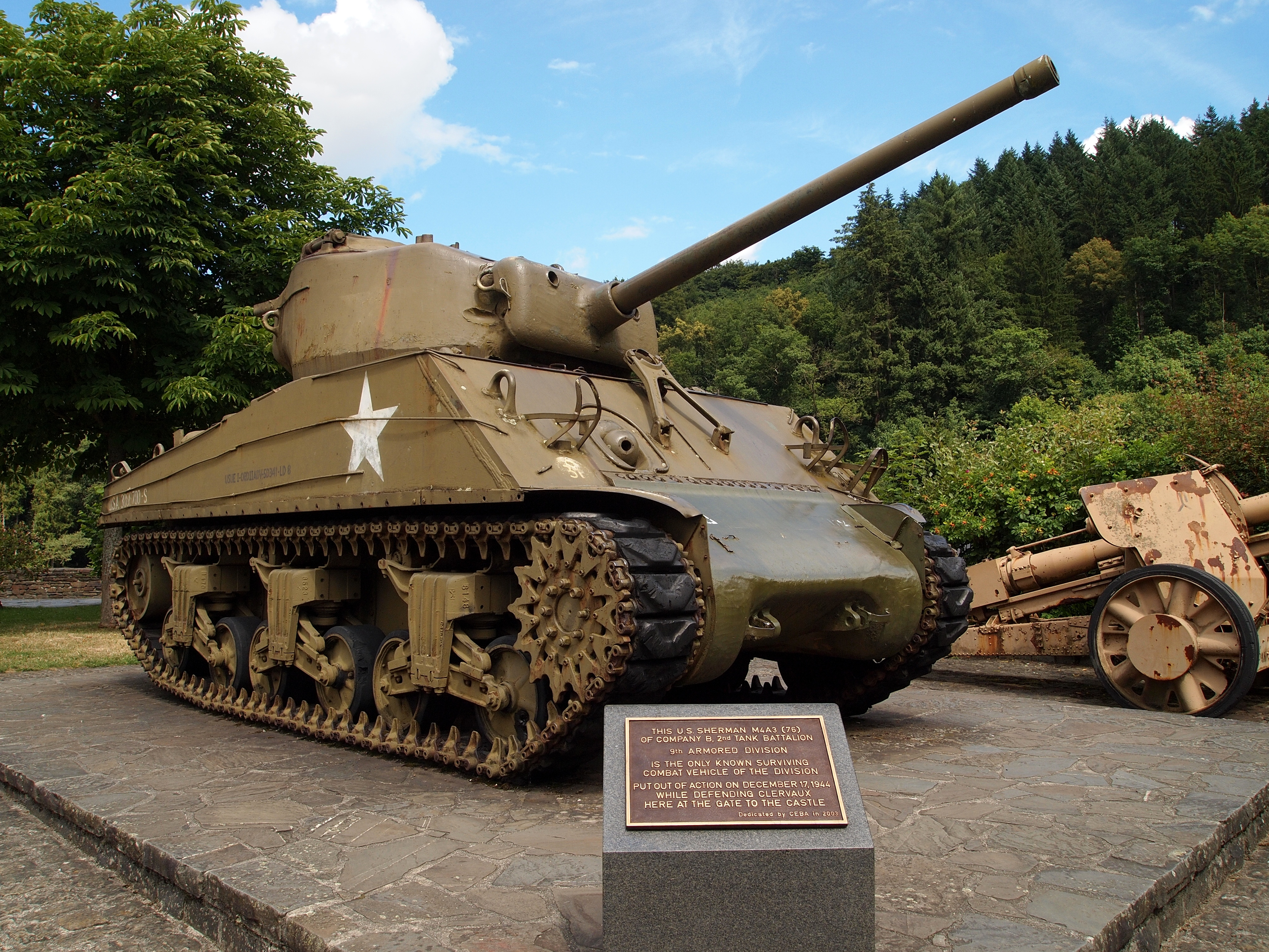 Sherman tank, Clervaux